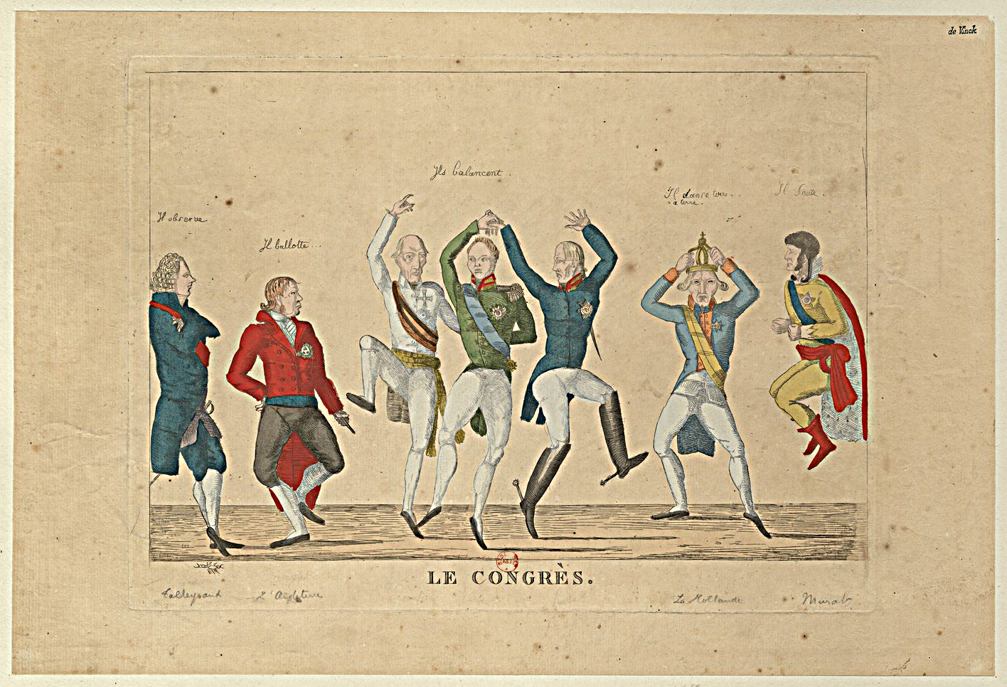 Forceval, graveur.- Le Congrès de Vienne, 1814-1815. Estampe appartenant à l’ensemble documentaire Est19Vinck.